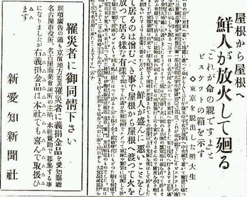 鮮人が放火して回る